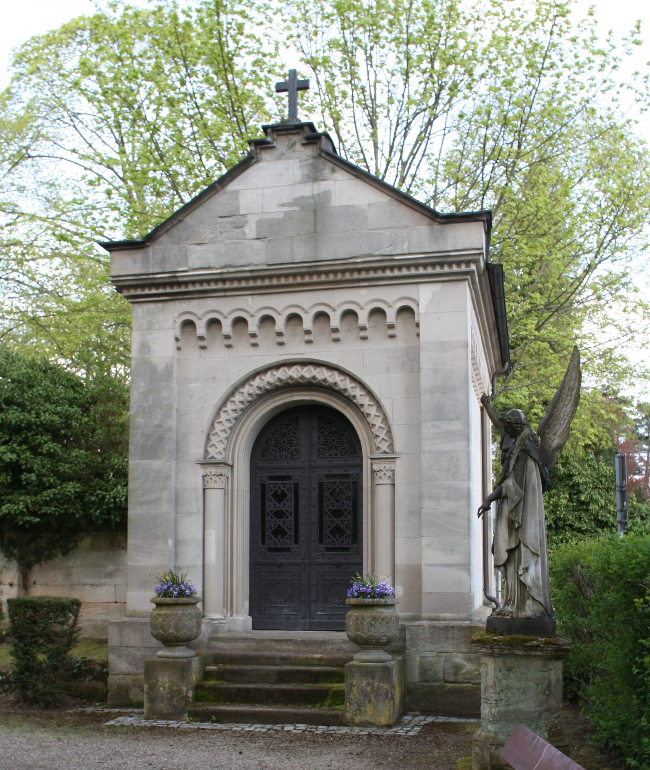 Stockmarsche Gruftkapelle des Friedhofes am Glockenberg, Coburg